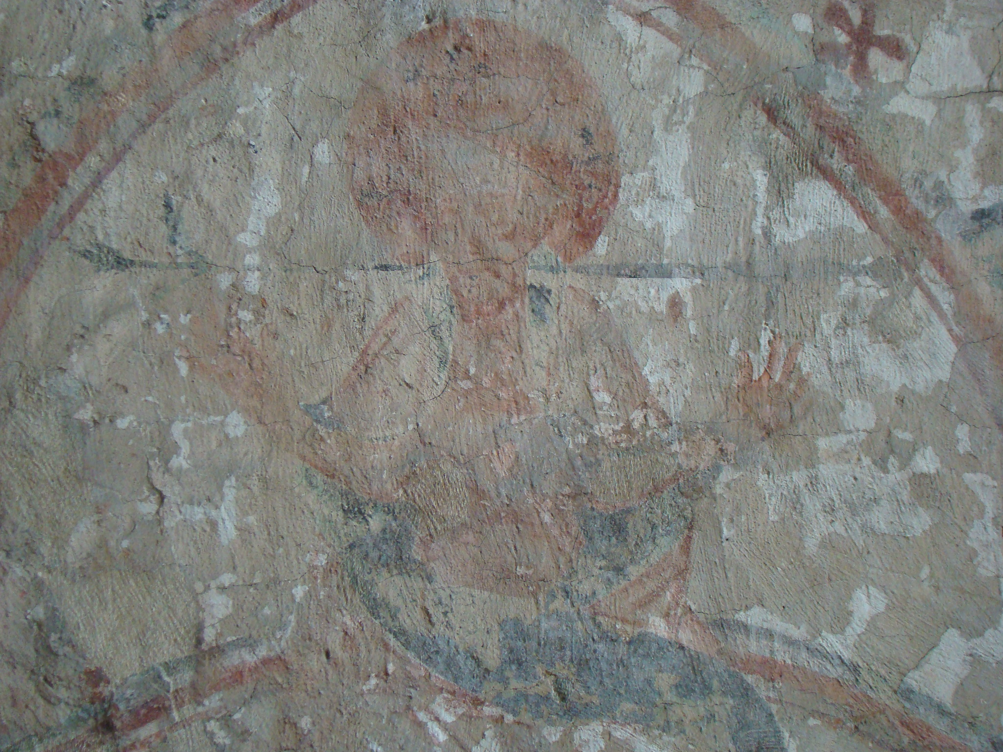 Konzertkirche (ehem. Marienkirche) in Neubrandenburg, letztes erhaltenes Fresko